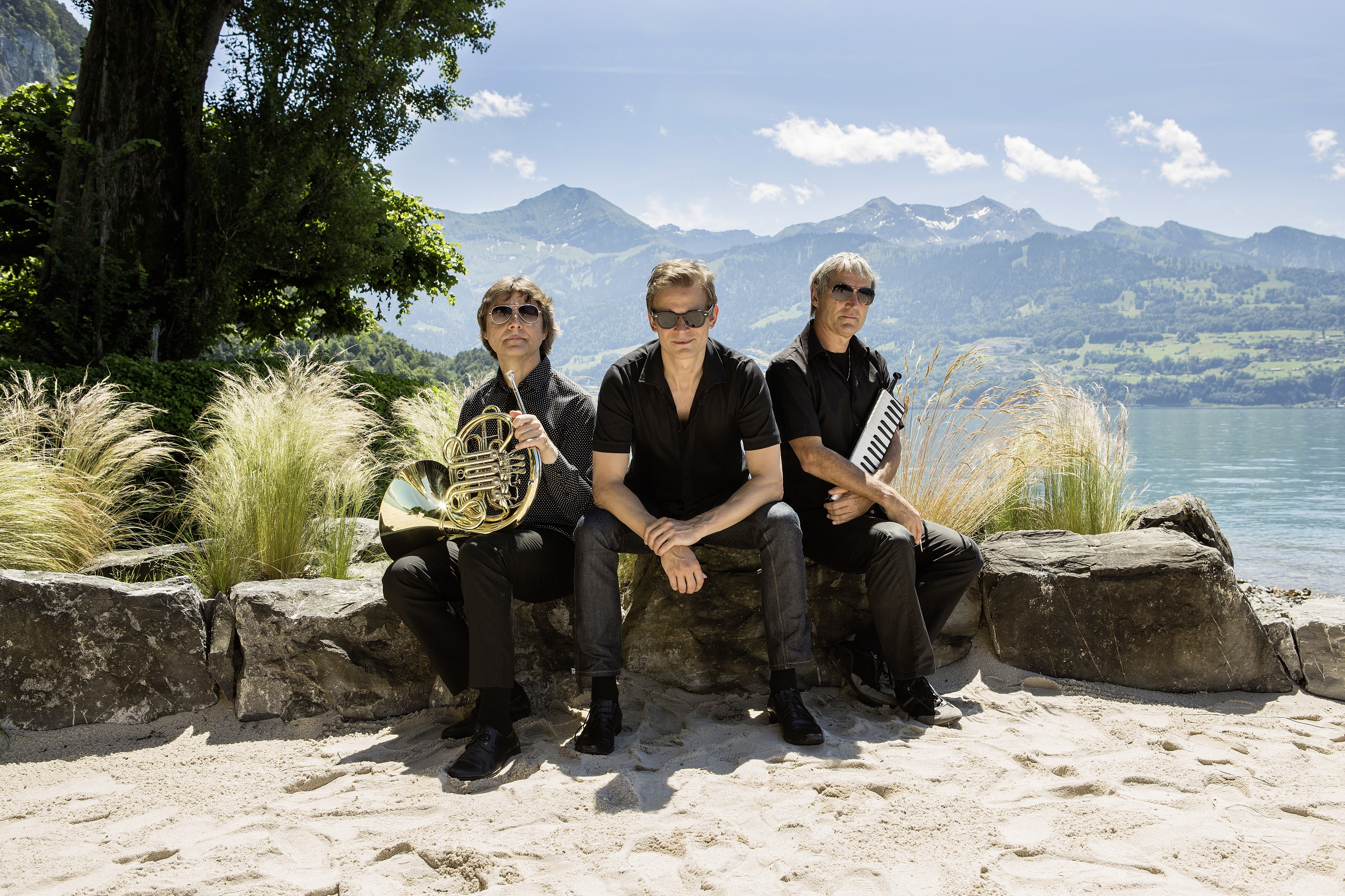 Цендер, Джон Бреннан и Аркадий Шилклопер